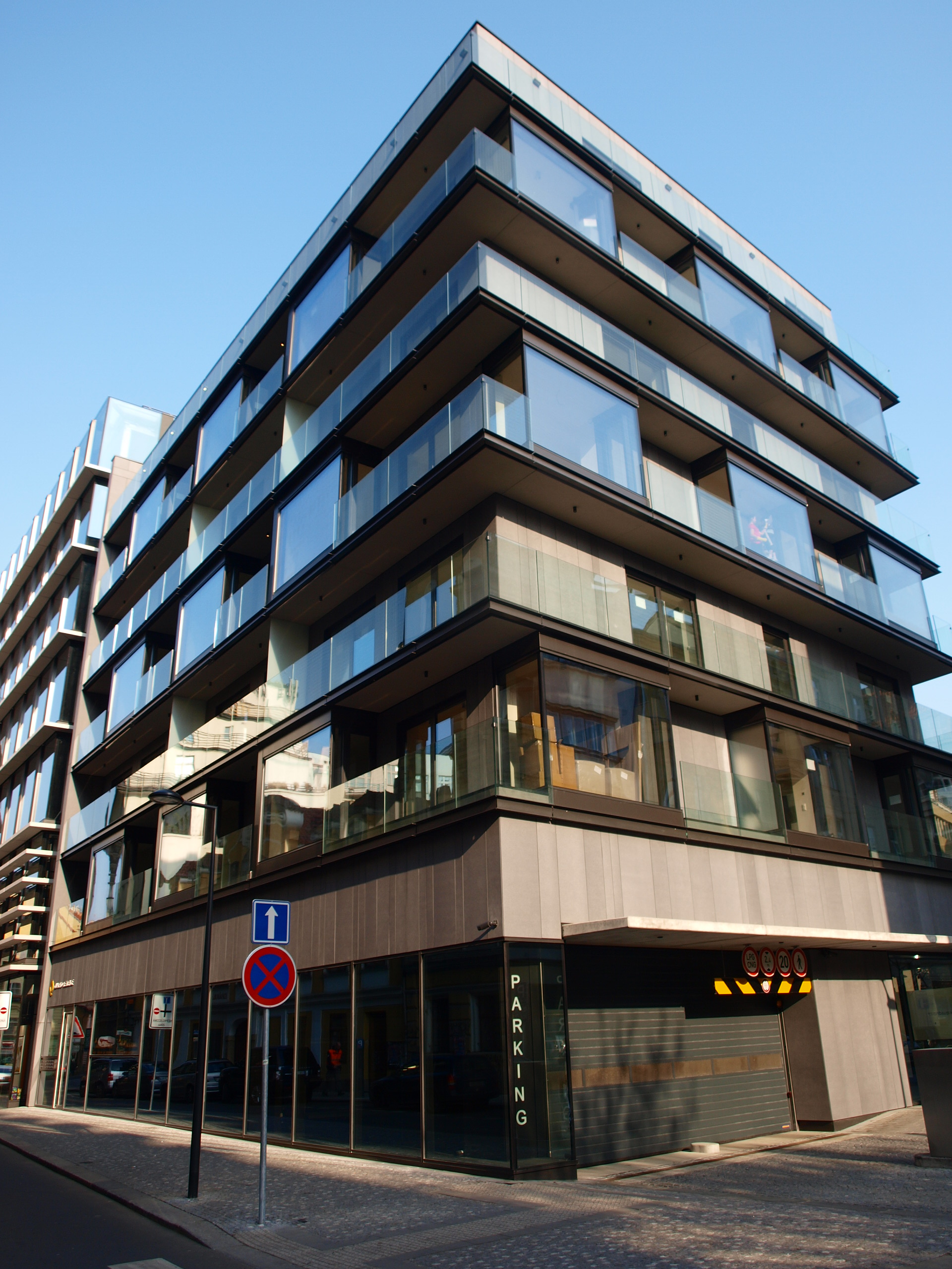 Quadrio Praha